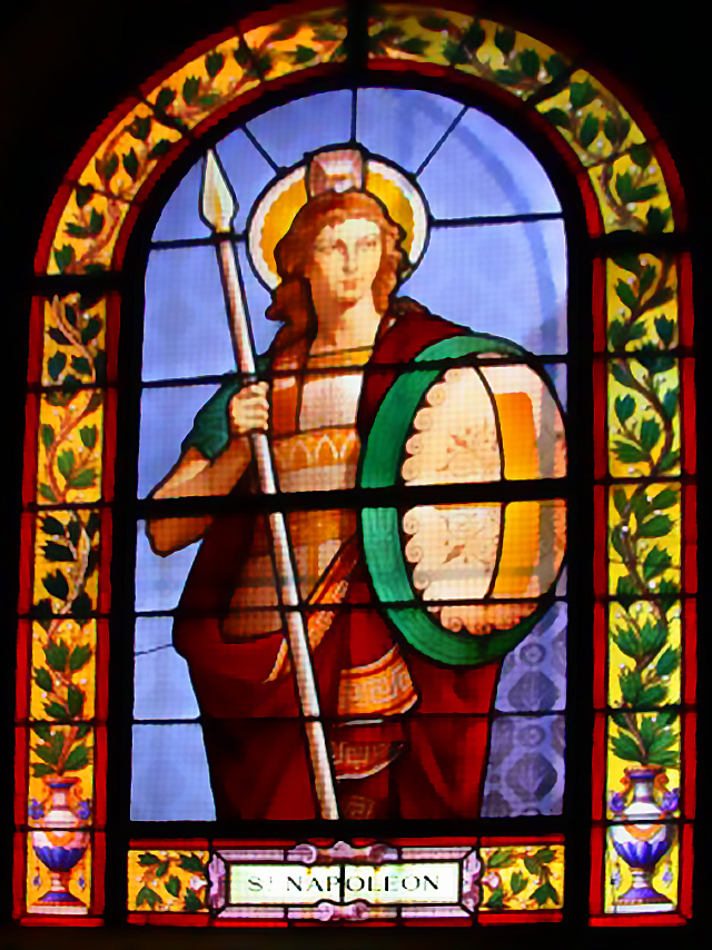 Vitrail de l'église du Chesnay représentant Saint-Napoléon. Ce vitrail fut donné à l'église par Madame Furtado Hein, épouse du petit fils du Maréchal Ney, en 1882